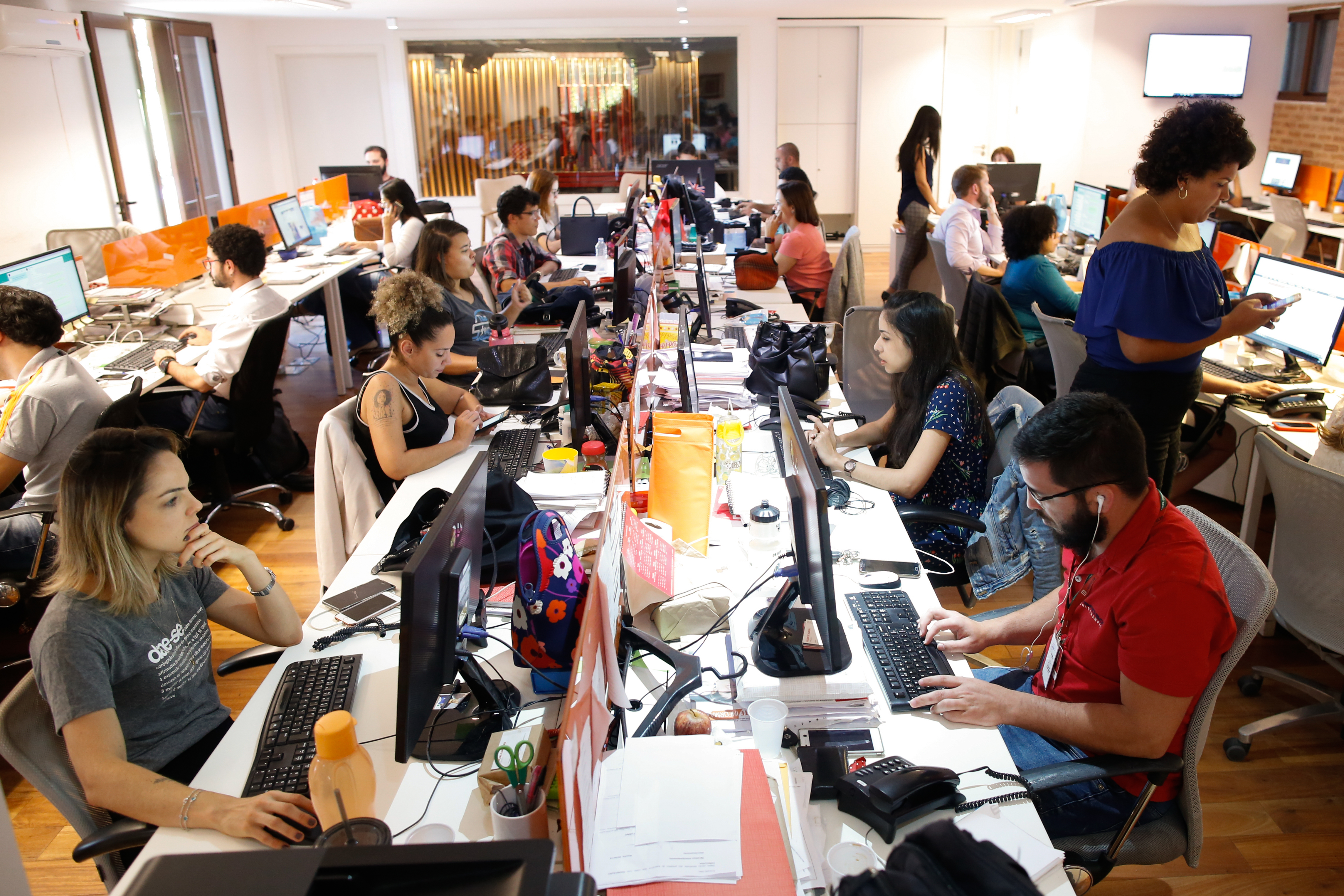 Redação do Portal Metrópoles